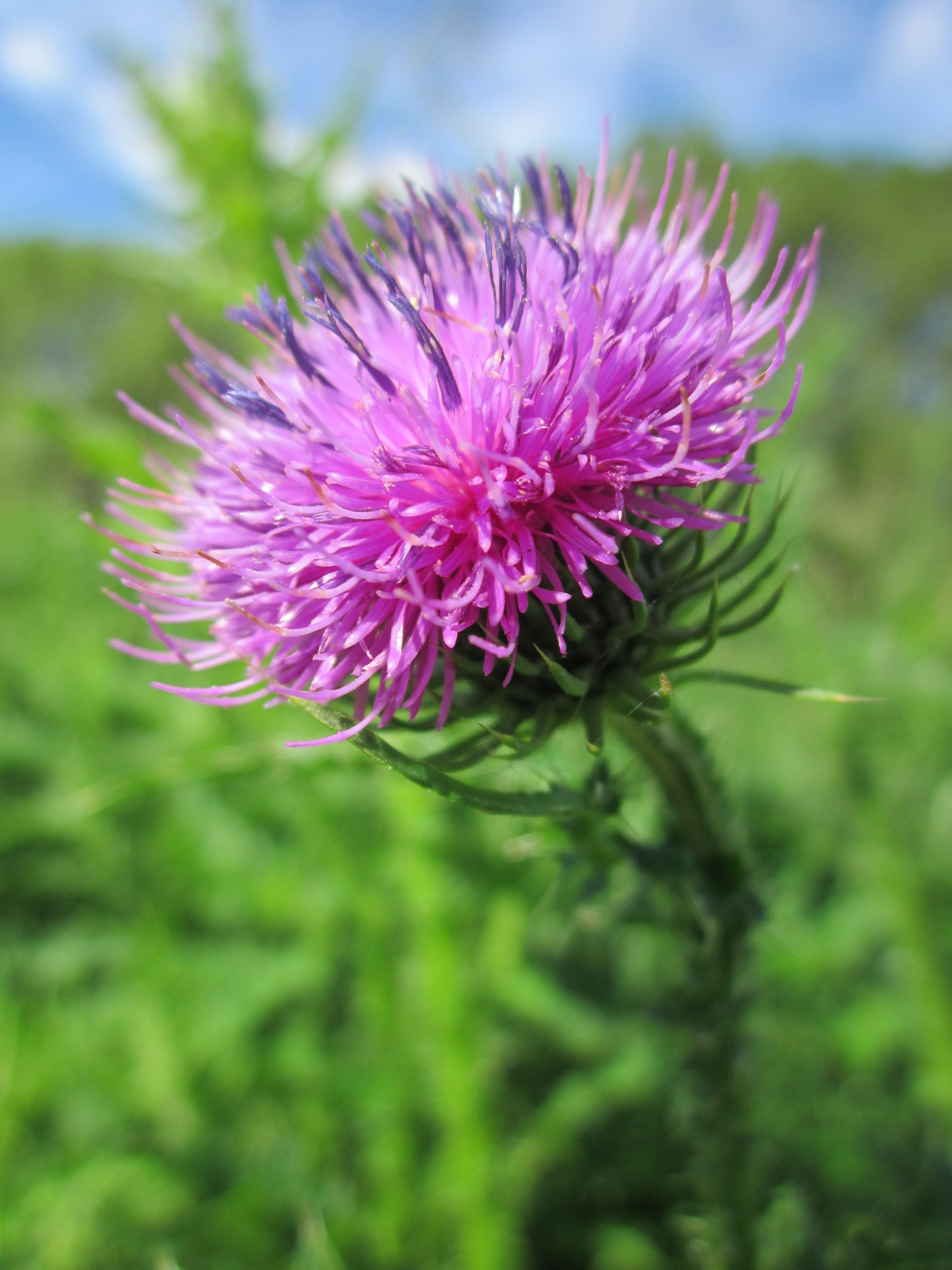 Weg-Distel (Carduus acanthoides) an der Saar in Saarbrücken